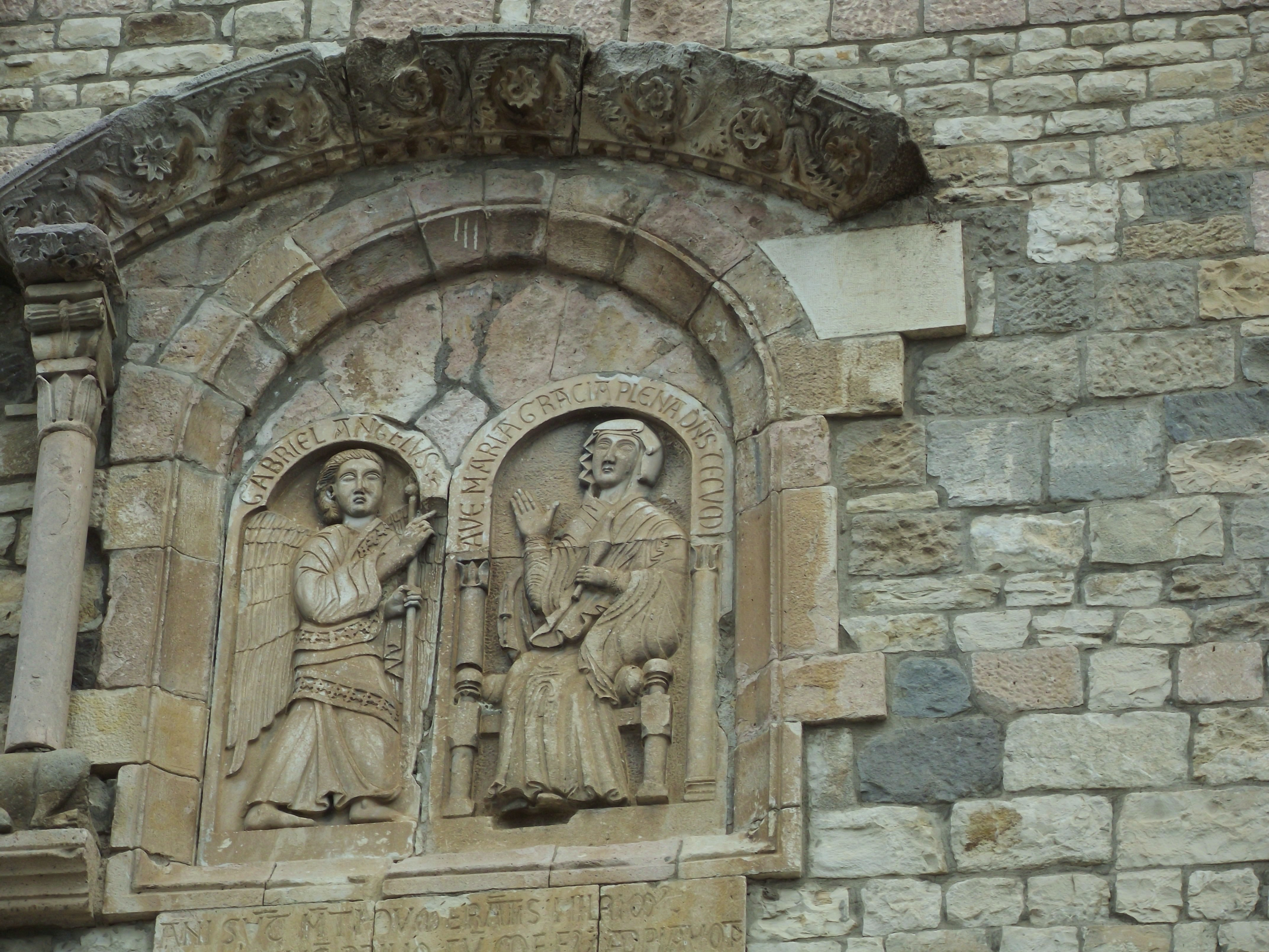 bassorilievo dell'Annunciazione nel fianco destro del Duomo di Rapolla